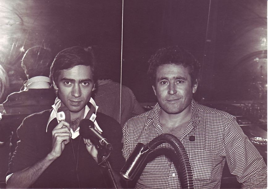 Sasà Capobianco e Ciro Niespolo, fotografati all'interno della discoteca Kiss Kiss di Napoli, nel 1976